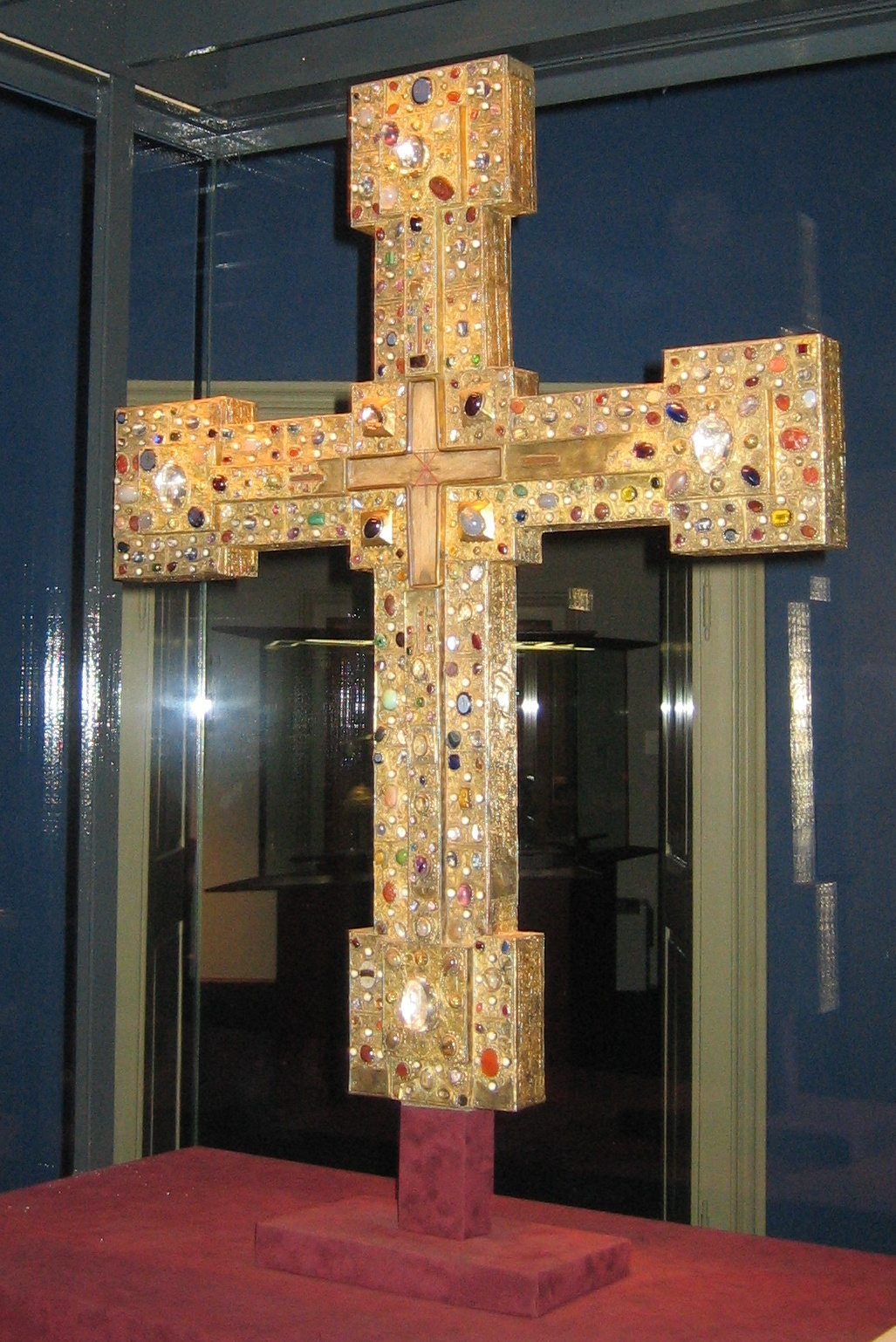 Adelheid-Kreuz, 11.-12. Jahrhundert, Stiftsmuseum St. Paul im Lavanttal